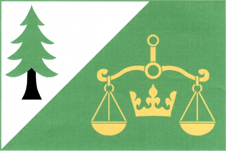 vlajka, Chlum, okres Třebíč